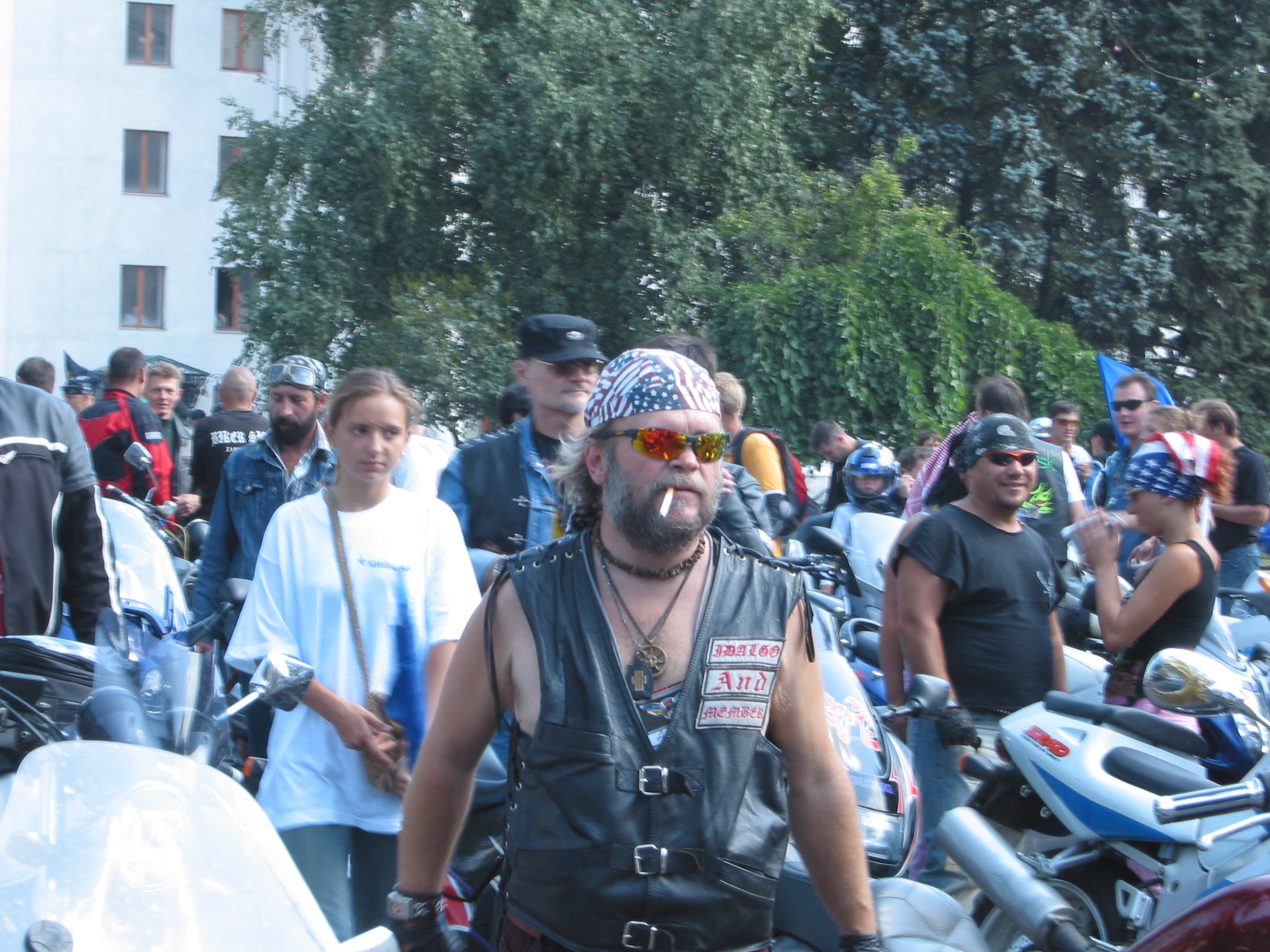 Донецк. Байк-шоу.